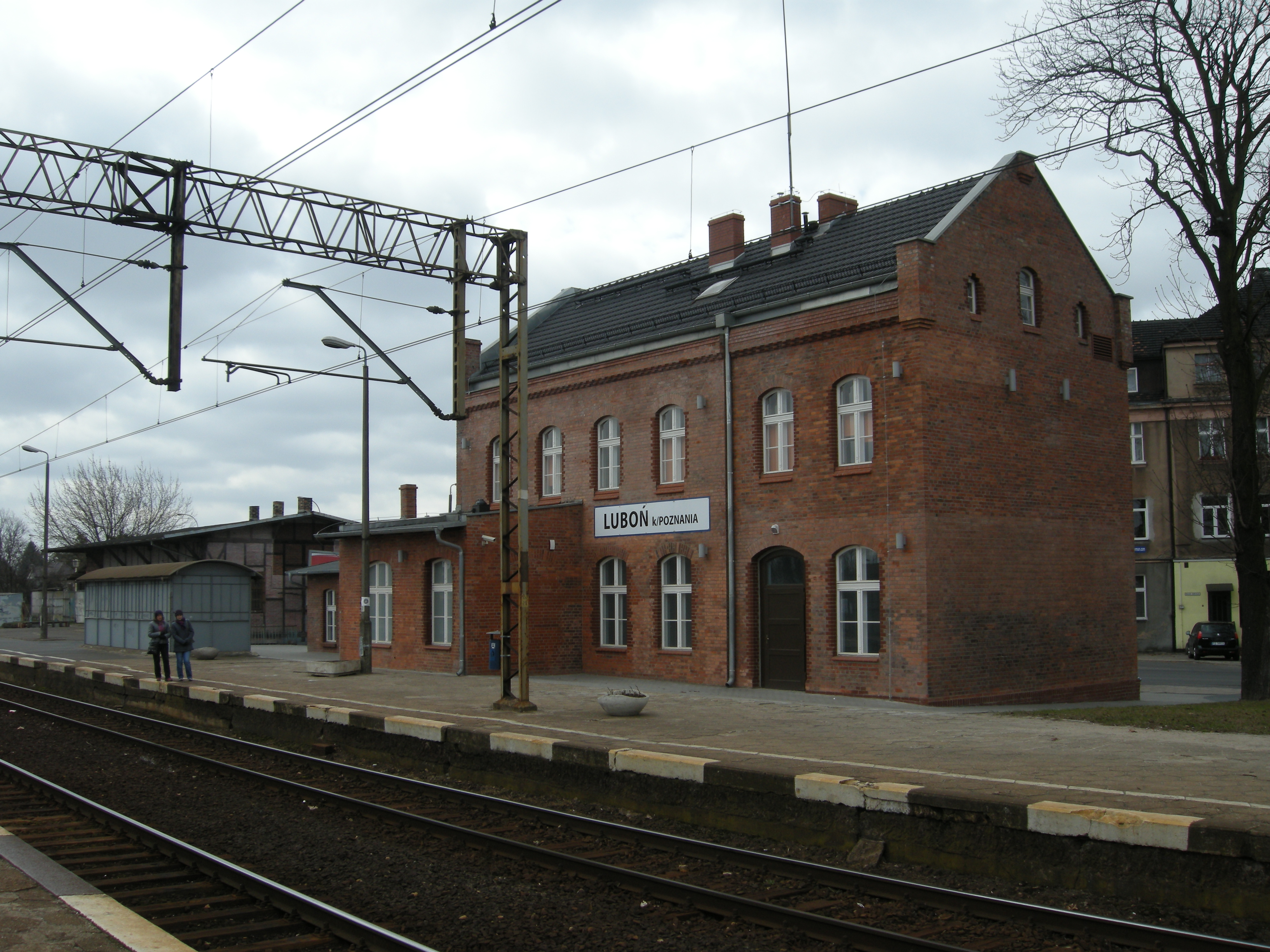 Dworzec kolejowy Luboń koło Poznania. Polska.